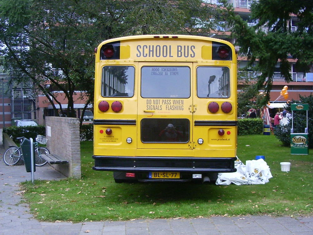 Achterkant schoolbus, gefotografeerd in Doorwerth (nl).